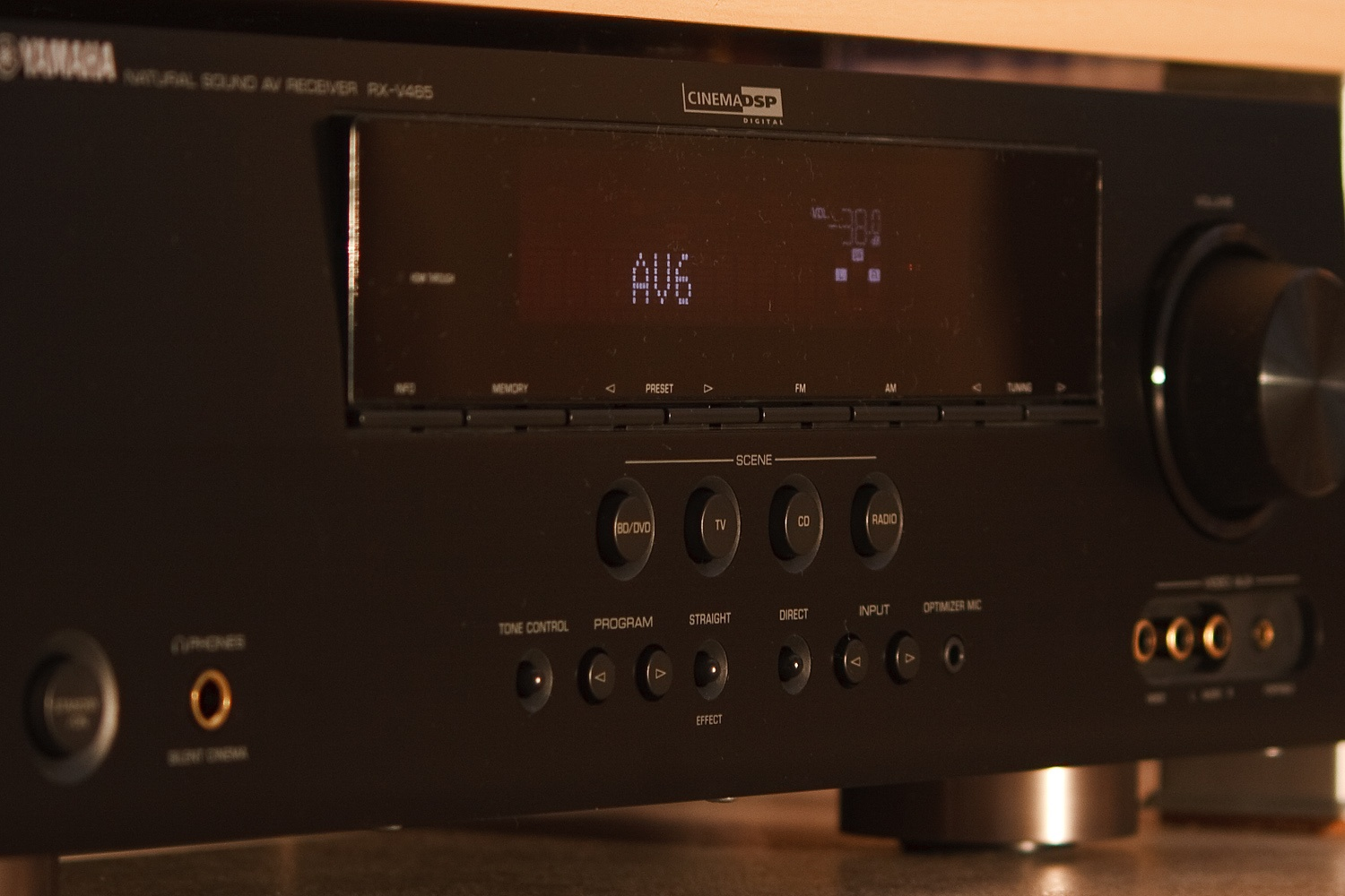 Hifi-Anlage, Datum/Uhrzeit: 18.07.2009 18:57:54